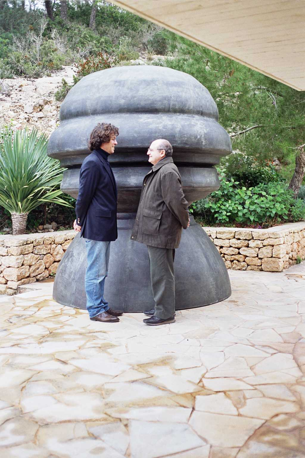 Escultura de Frederic Berthelot que representa a Abel Matutes.